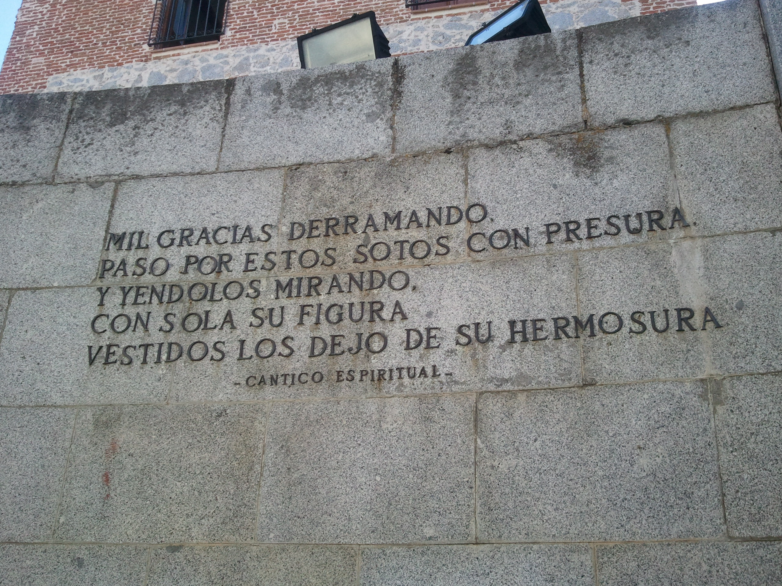 Inscripción del Cántico Espiritual de San Juan de la Cruz, Ávila, España.